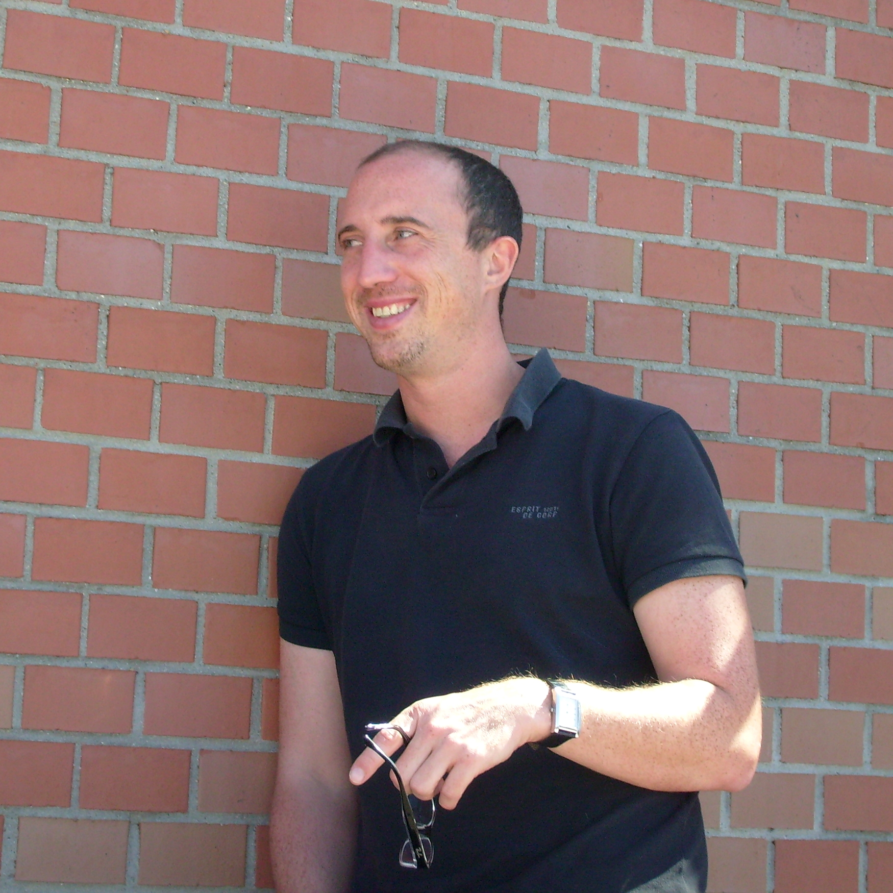 Tobias Elsäßer (* 1973), deutscher Kinder- und Jugendbuchautor, Sänger und Songwriter, am 31. August 2009 in Neckarwestheim.